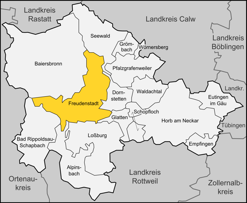 Karte der Stadt Freudenstadt im Landkreises Freudenstadt